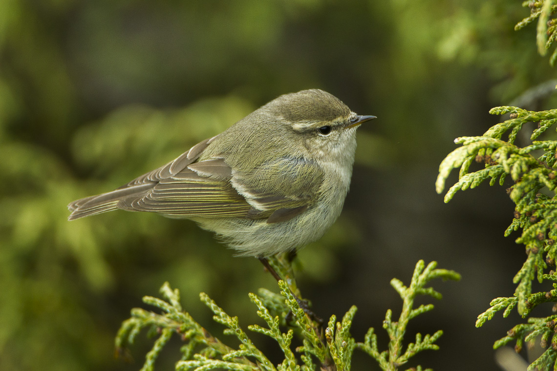 Hume's Warbler - Kazakistan_S4E4106